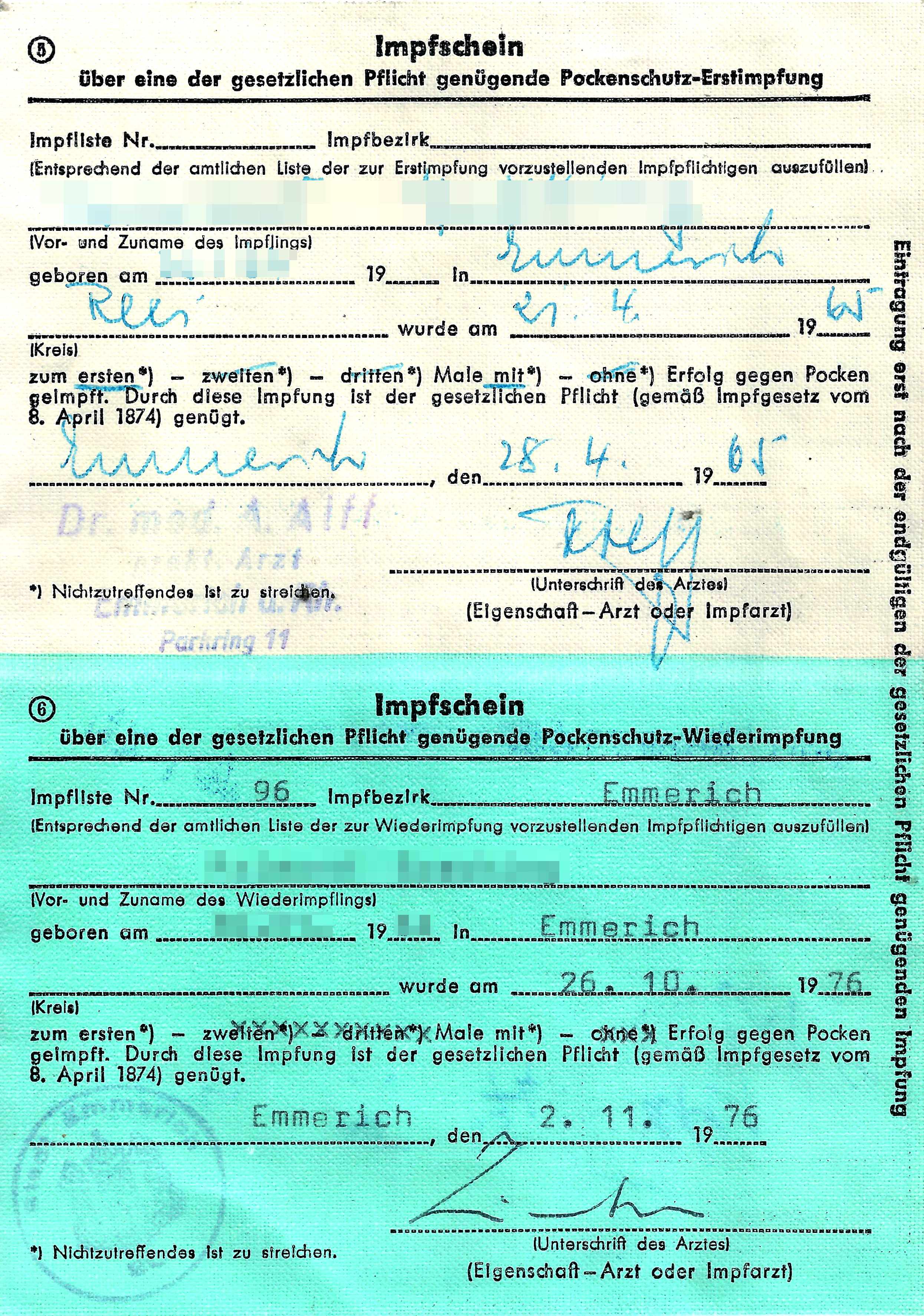 Kombinierter Impfschein „über eine der gesetzlichen Pflicht genügenden Pockenschutz-Erstimpfung“, ausgestellt durch einen Emmericher Arzt am 21. April 1965 und „über eine der gesetzlichen Pflicht genügenden Pockenschutz-Wiederimpfung“, ausgestellt durch die Stadt Emmerich am 2. November 1976. „Durch diese Impfung ist der gesetzlichen Pflicht (gemäß Impfgesetz vom 8. April 1874) genügt.“